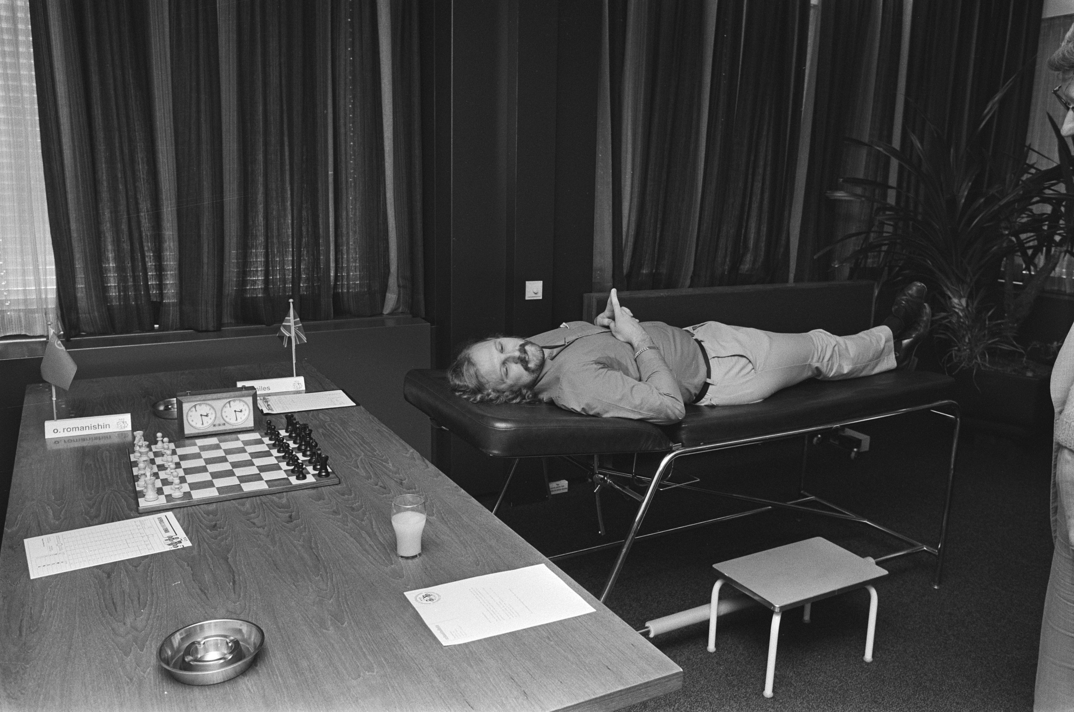 Interpolisschaaktoernooi Tilburg 1985; Miles (met rugklachten) ligt op massagetafel te wachten op zijn tegenstander.